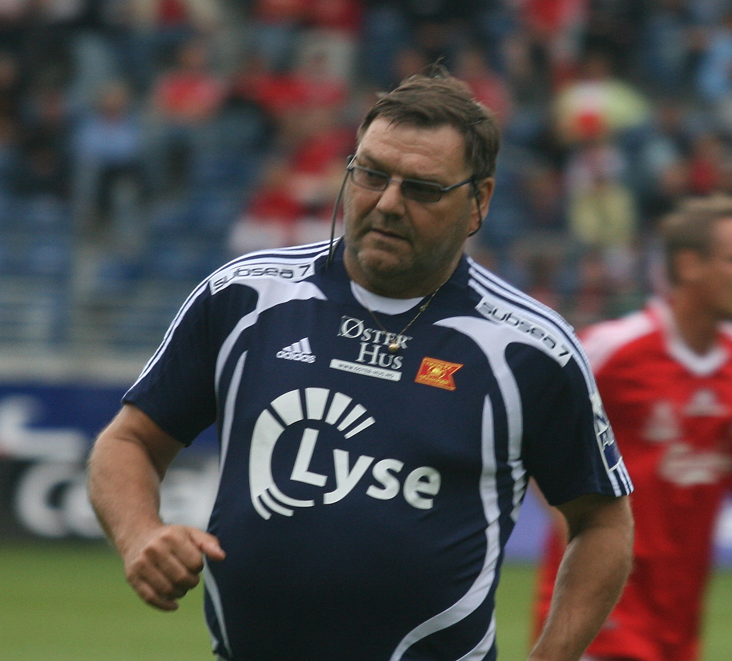 Trygve Johannessen